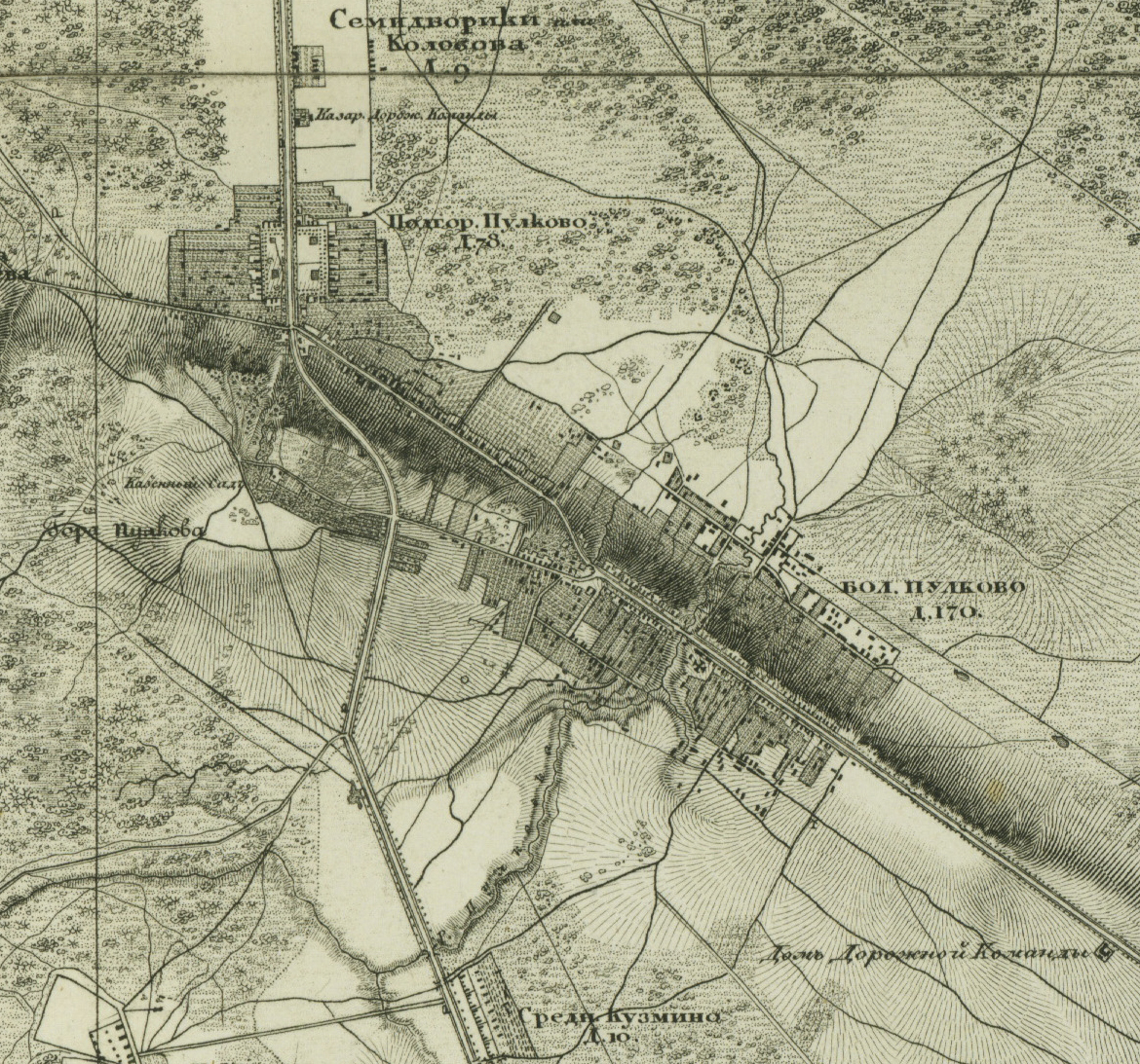 Пулково в 1831 году